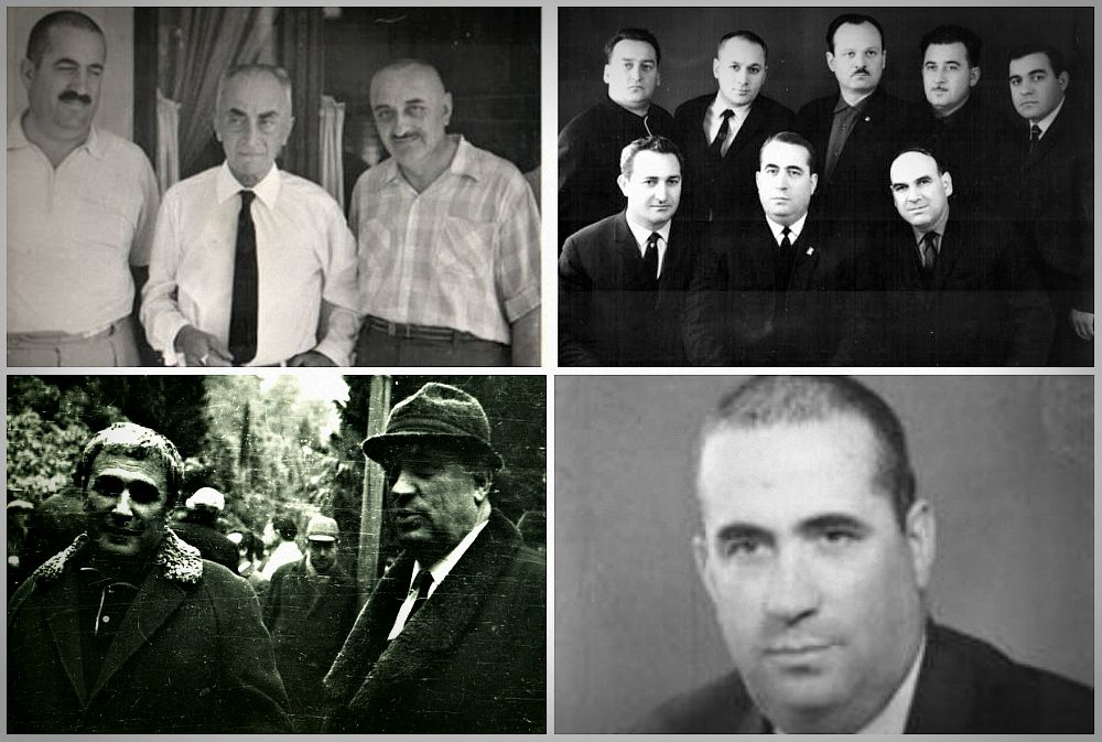 Ясон Герсамия с Константином Гамсахурдия,Нодаром Думбадзе и коллегами по работе.